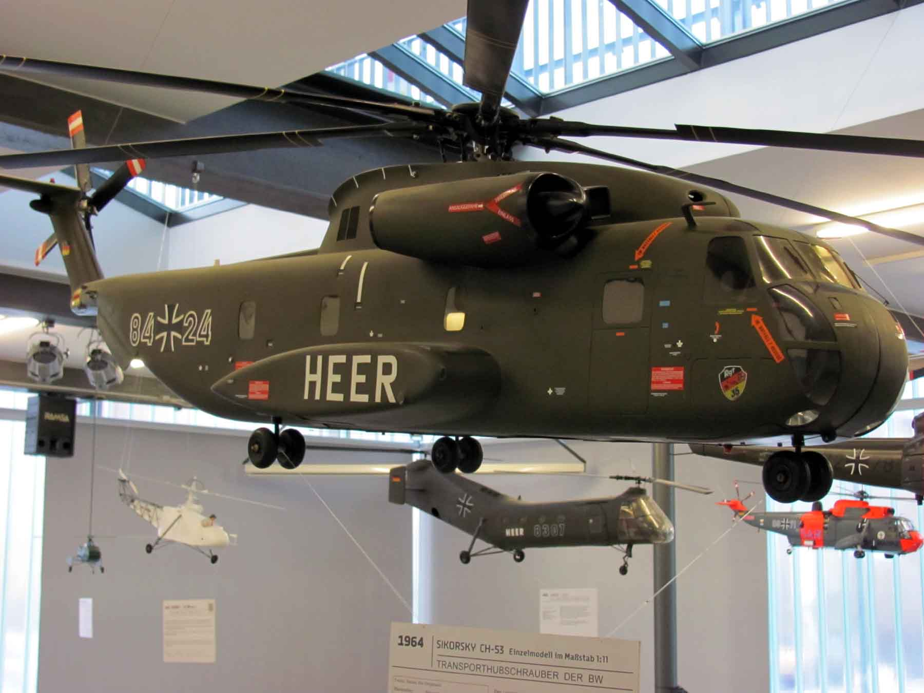 Sikorsky S-65 / CH 53G Massstab 1 : 11 im Hubschraubermuseum Bueckeburg